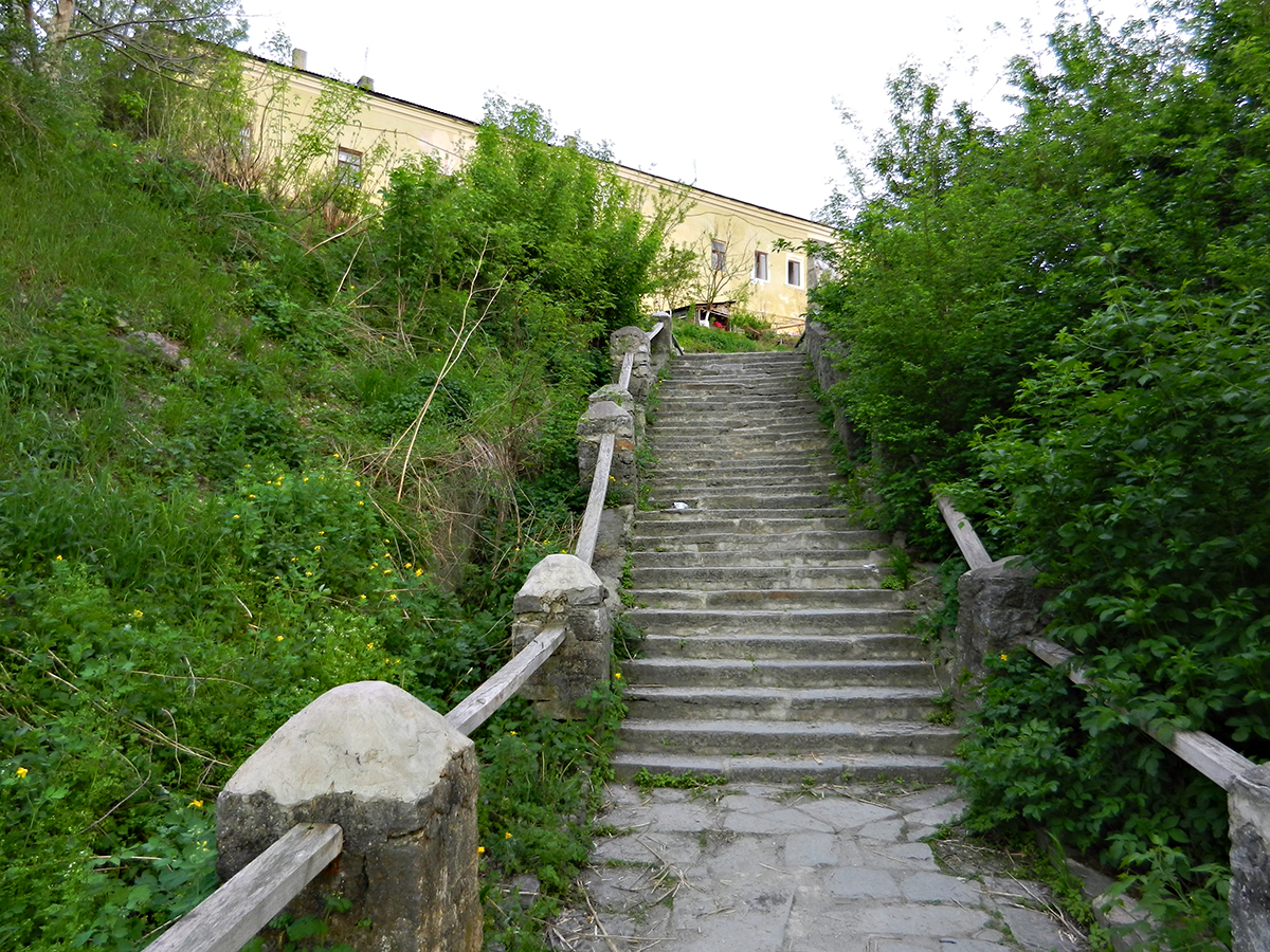 Хмельницька область, м.Кам'янець-Подільський